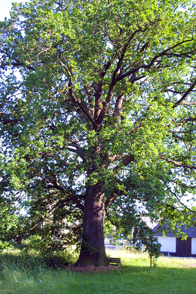 Dub v Lučici u Chudenic.